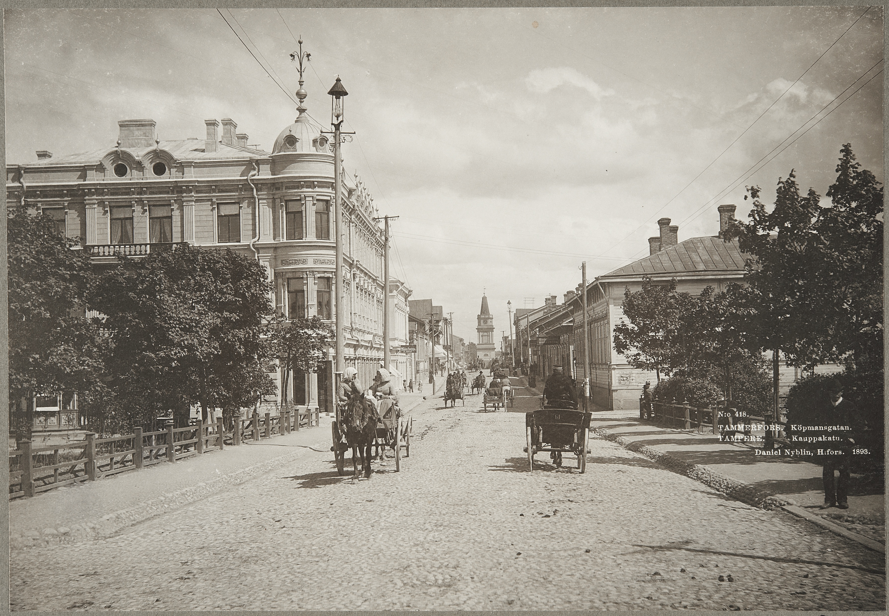 Kauppakatu, Tampereen entinen pääkatu, vuonna 1893. Kadun päätteenä näkyy C. L. Engelin suunnittelema Vanhan kirkon tapuli, joka on rakennettu vuonna 1828. Valokuvan vasemmassa laidassa on F. L. Caloniuksen piirtämä Spriitehtaan talo (myöhemmältä kutsumanimeltään Branderin talo; Kauppakatu 16). Rakennus valmistui 1891, ja se purettiin 1962.